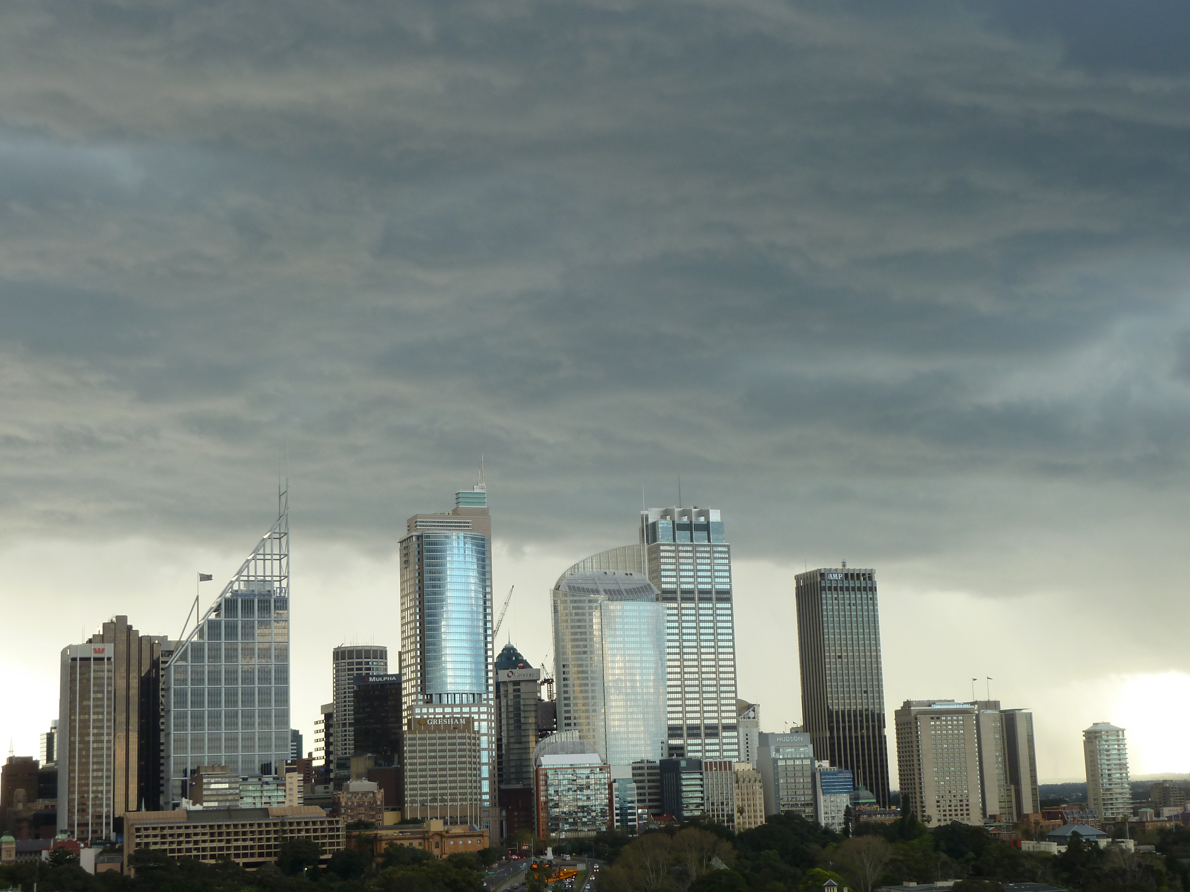 Storm Clouds Over Sydney 3